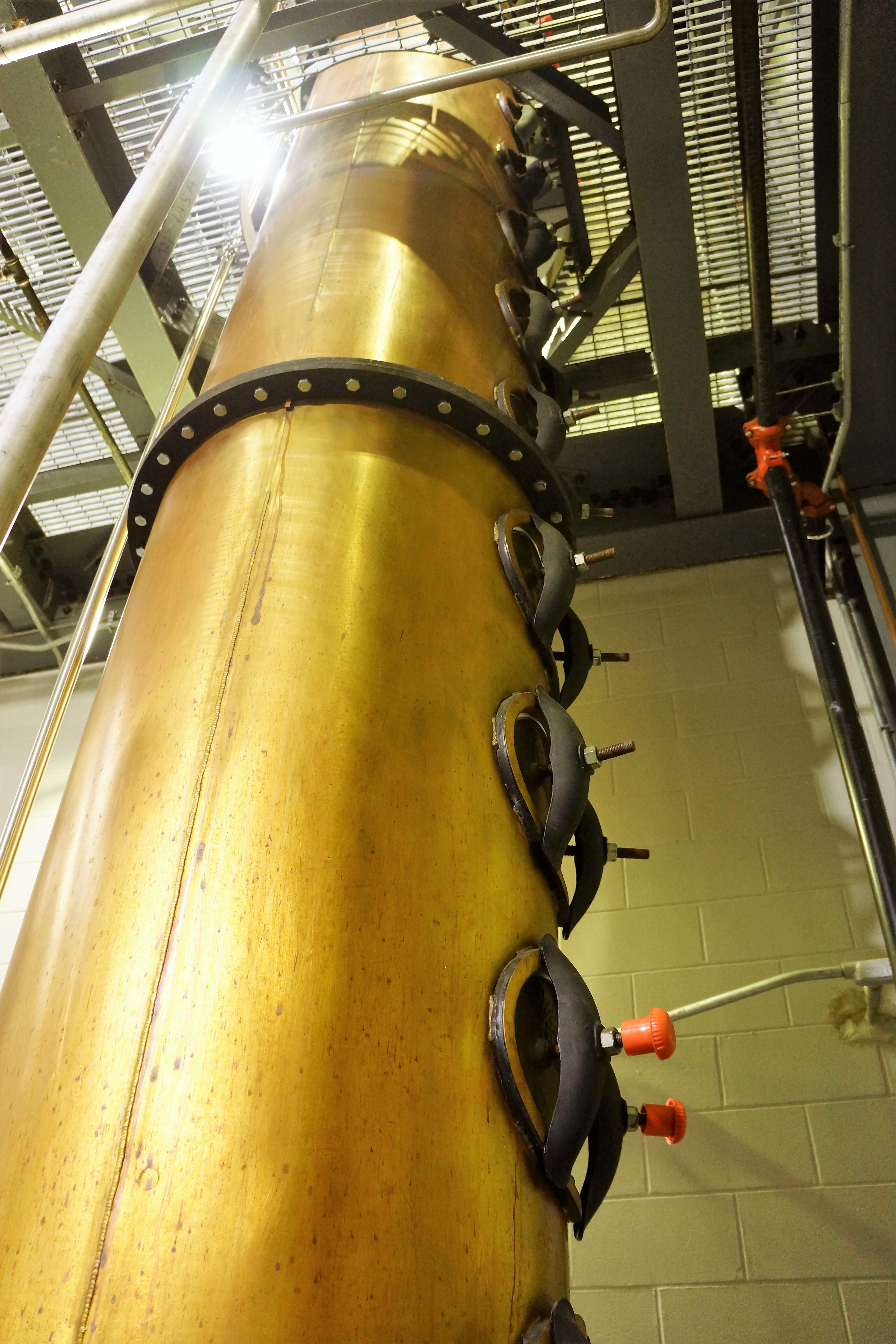 Column Still at Michter's Distillery